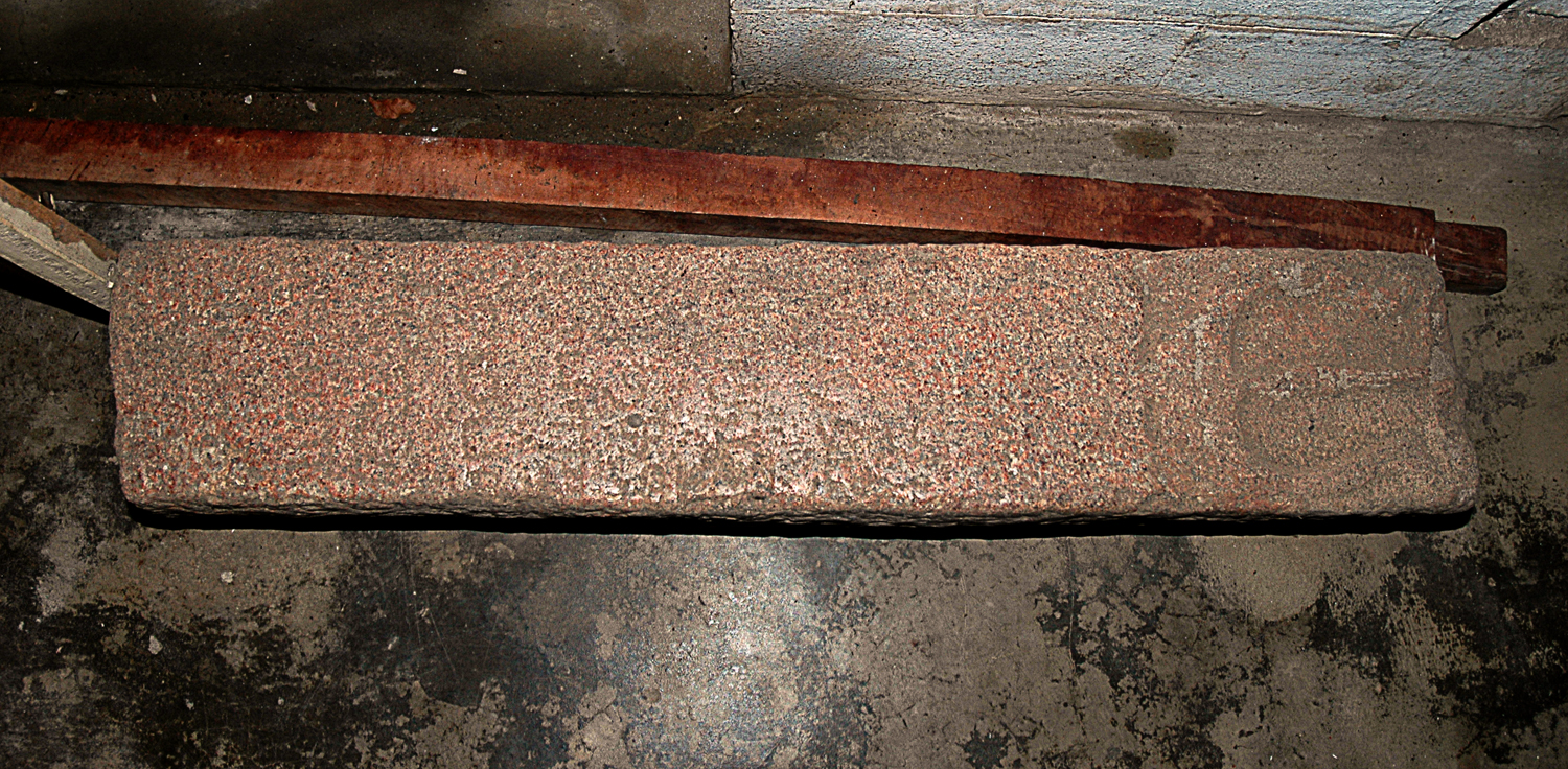 தமிழ் கல்வெட்டு (கந்தரோடை) - தொல் பொருட்காட்சிச்சாலை, யாழ்ப்பாணம்